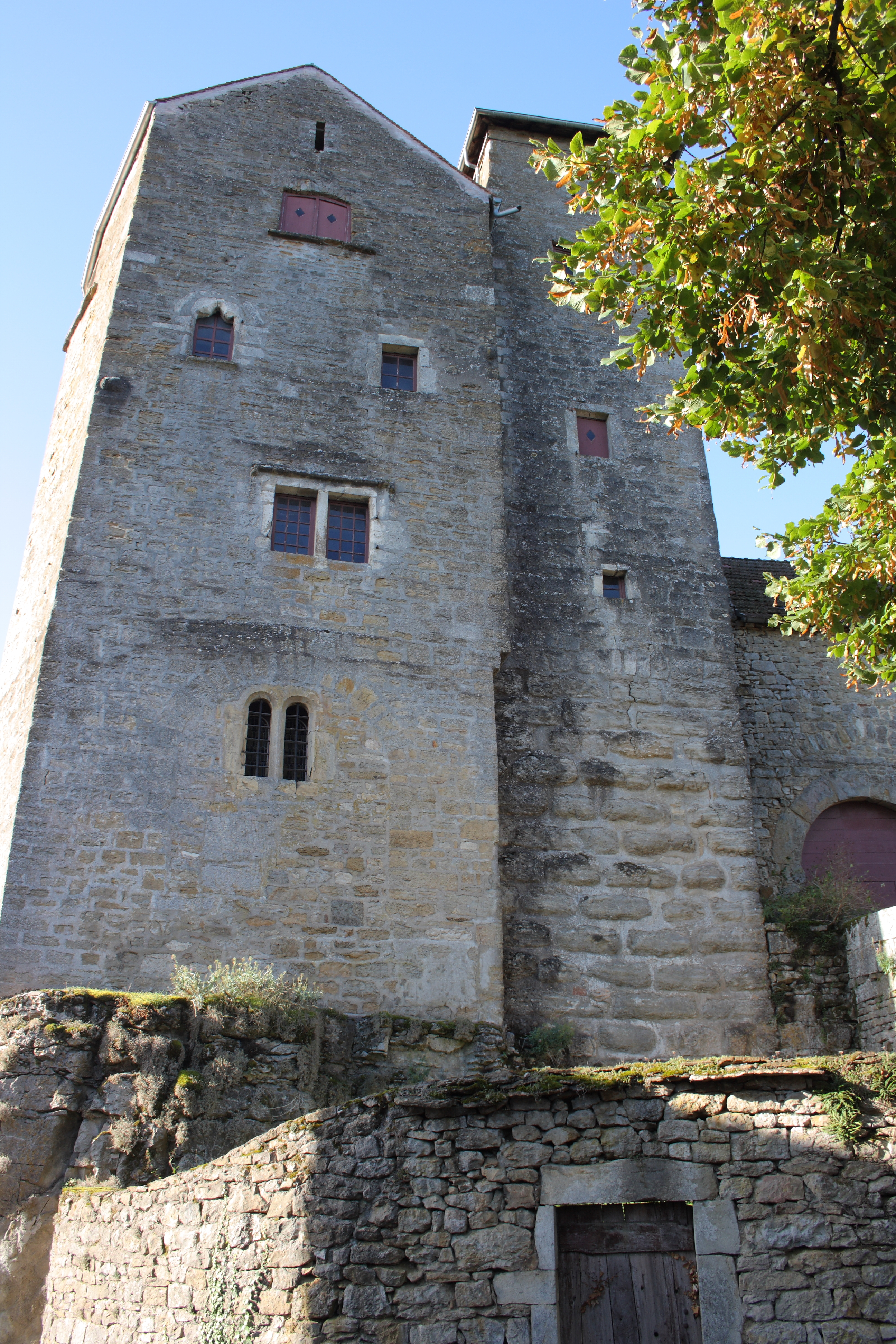 Schloss in Abbans-Dessus